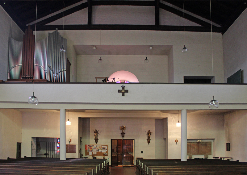 Blick ins Innere der katholischen Pfarrkirche St. Agatha in Merchingen, einem Stadtteil von Merzig, Landkreis Merzig-Wadern, Saarland.